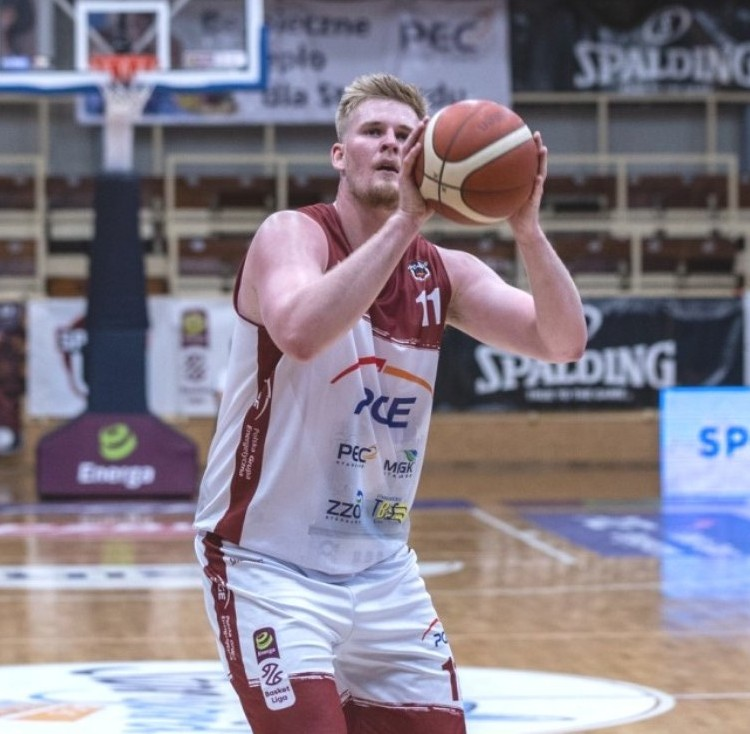 Harry Froling